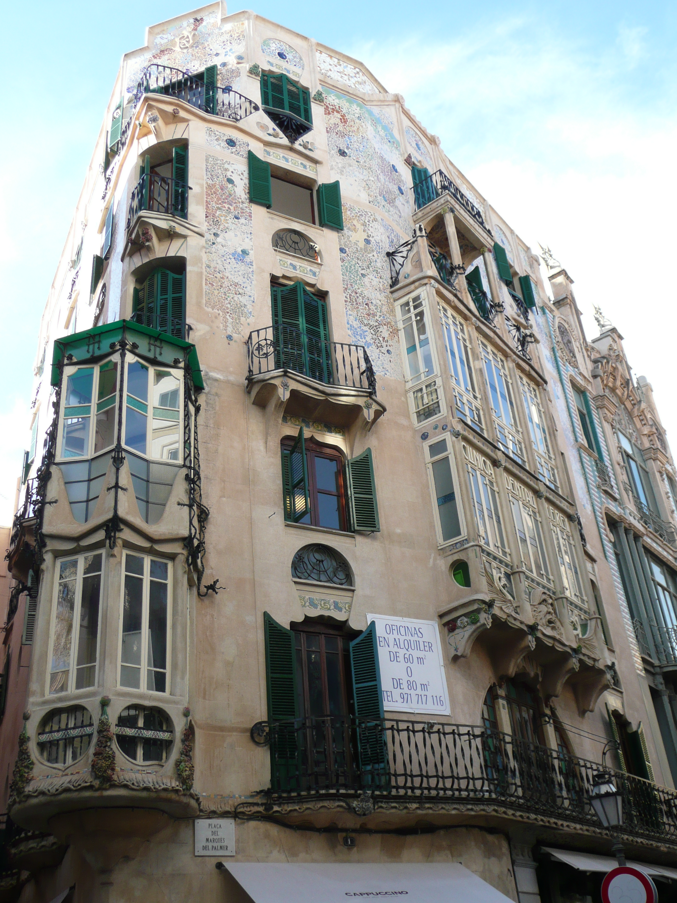 Can Forteza Rey in Palma de Mallorca Architect: Lluís Forteza-Rey i Forteza (1884-1920)